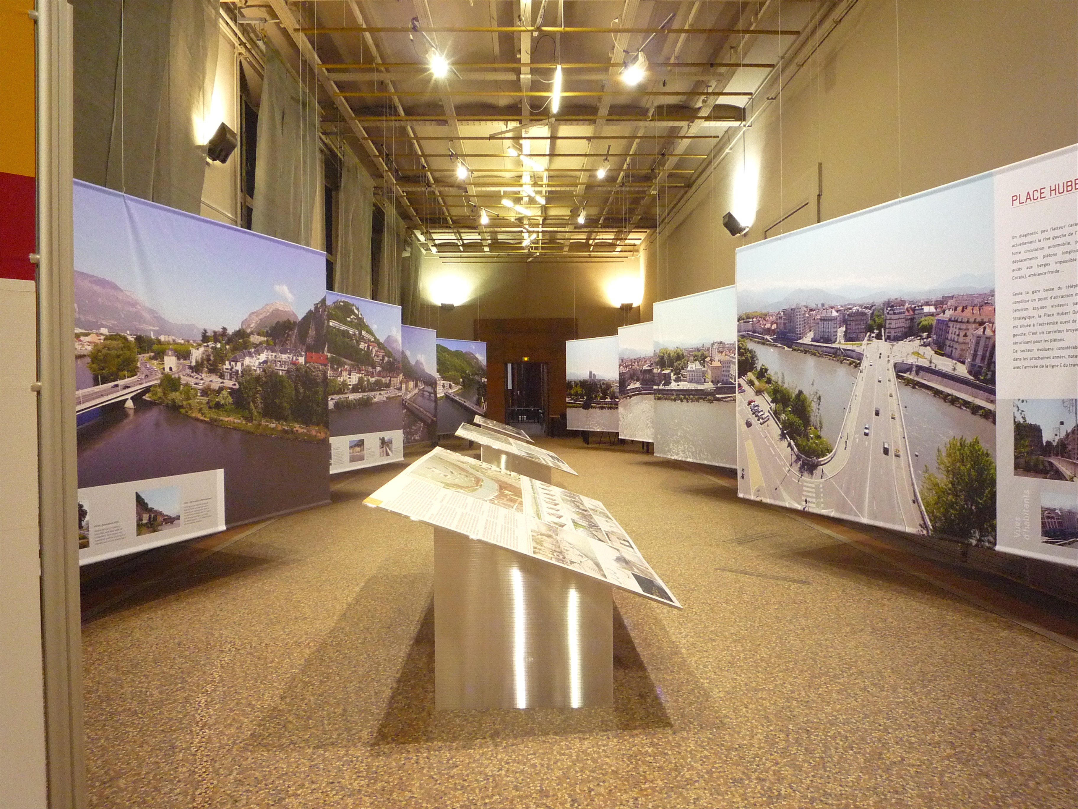 Salle la Plateforme présentant les projets d'urbanisme de la ville, musée-bibliothèque de Grenoble.